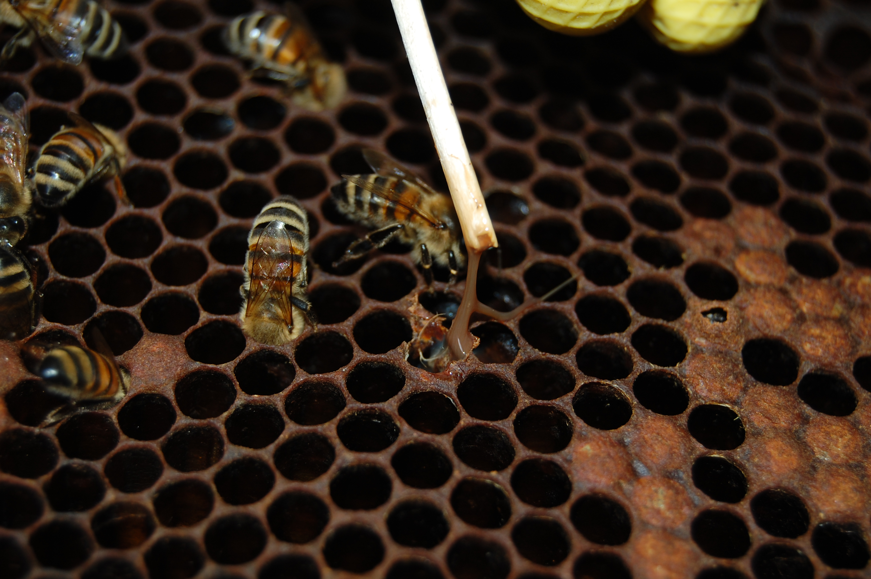 Tipico filamento di peste americana per diagnosticare la malattia